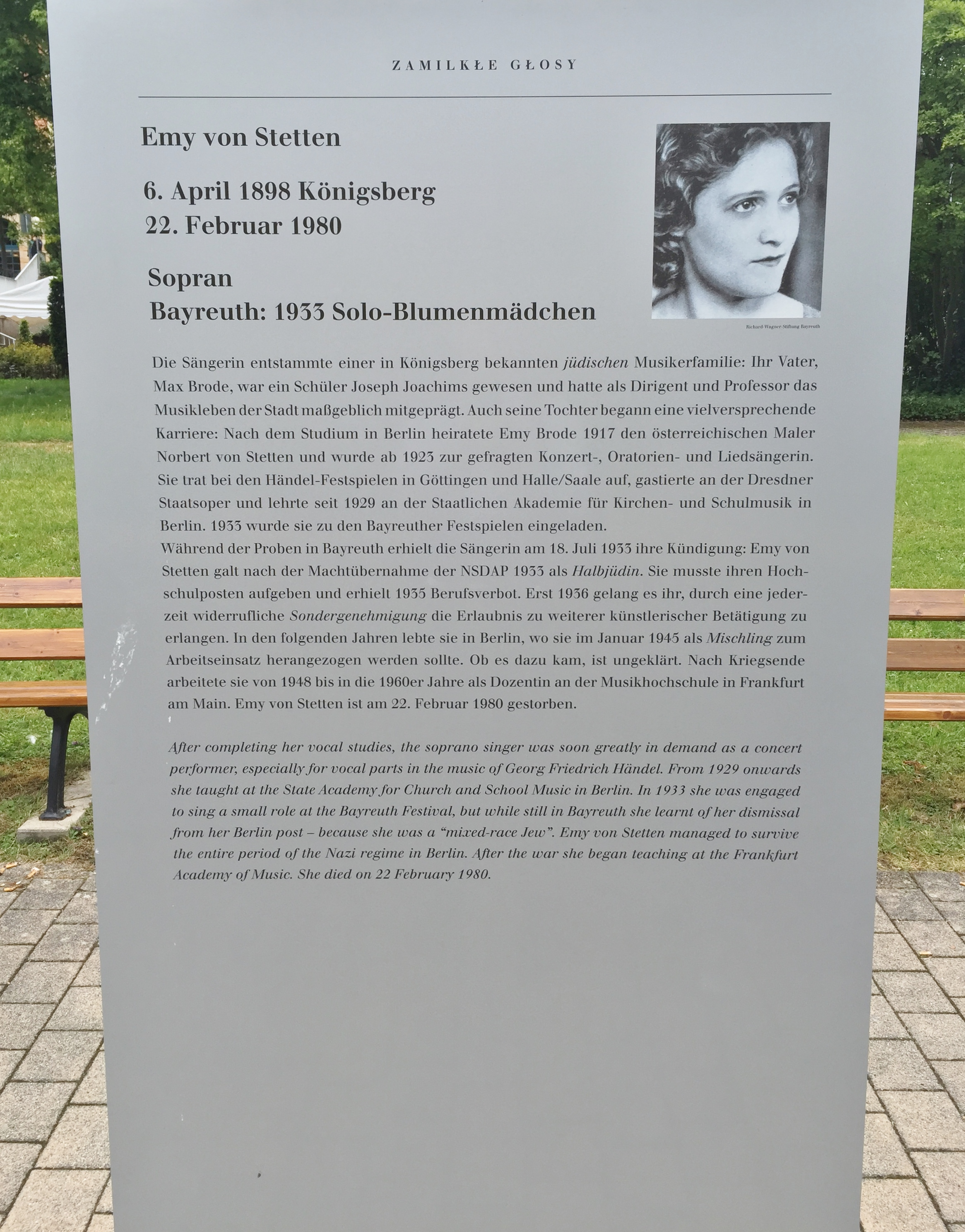 "Verstummte Stimmen - Die Bayreuther Festspiele und die 'Juden' 1876 bis 1945", Ausstellung 2016